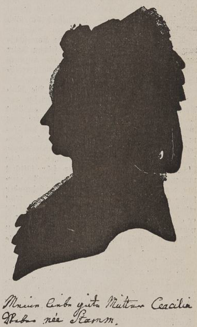 Das Schattenbild zeigt Cäcilia Weber, die Schwiegermutter von Mozart. Die handschriftliche Notiz stammt von ihrer Tochter Constanze Mozart, welche das Bild 1830 an dem ihr befreundeten Musiklehrer Friedrich Schwaan in Rostock geschenkt hat. Aktuell befindet sich dieses Examplar im Mozarteum in Salzburg.